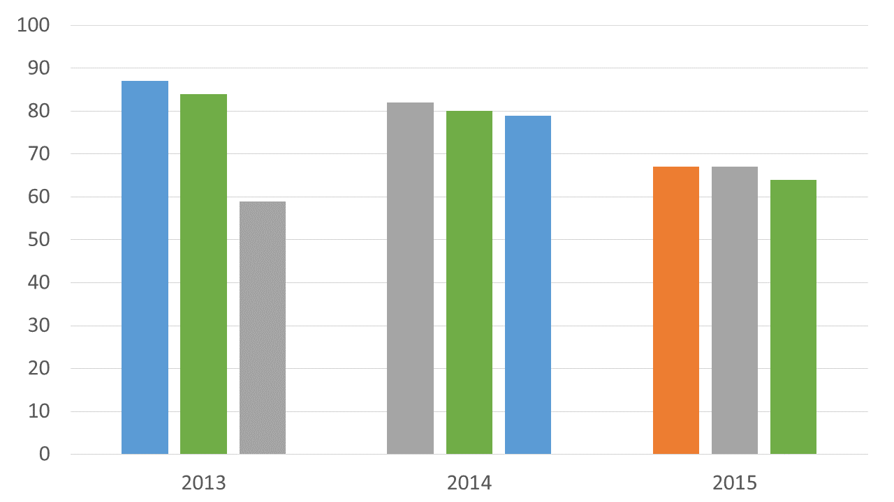 该图表显示西历2013~2015年福州第三中学高一新生来源初中前三名。 图中四种颜色分别代表的初中是： 绿：屏东； 蓝：十八中； 灰：十九中； 橙：励志。 数据来源：安梓〈福州三中生源数据简析〉，载于2016年6月13日《福州晚报》B16页